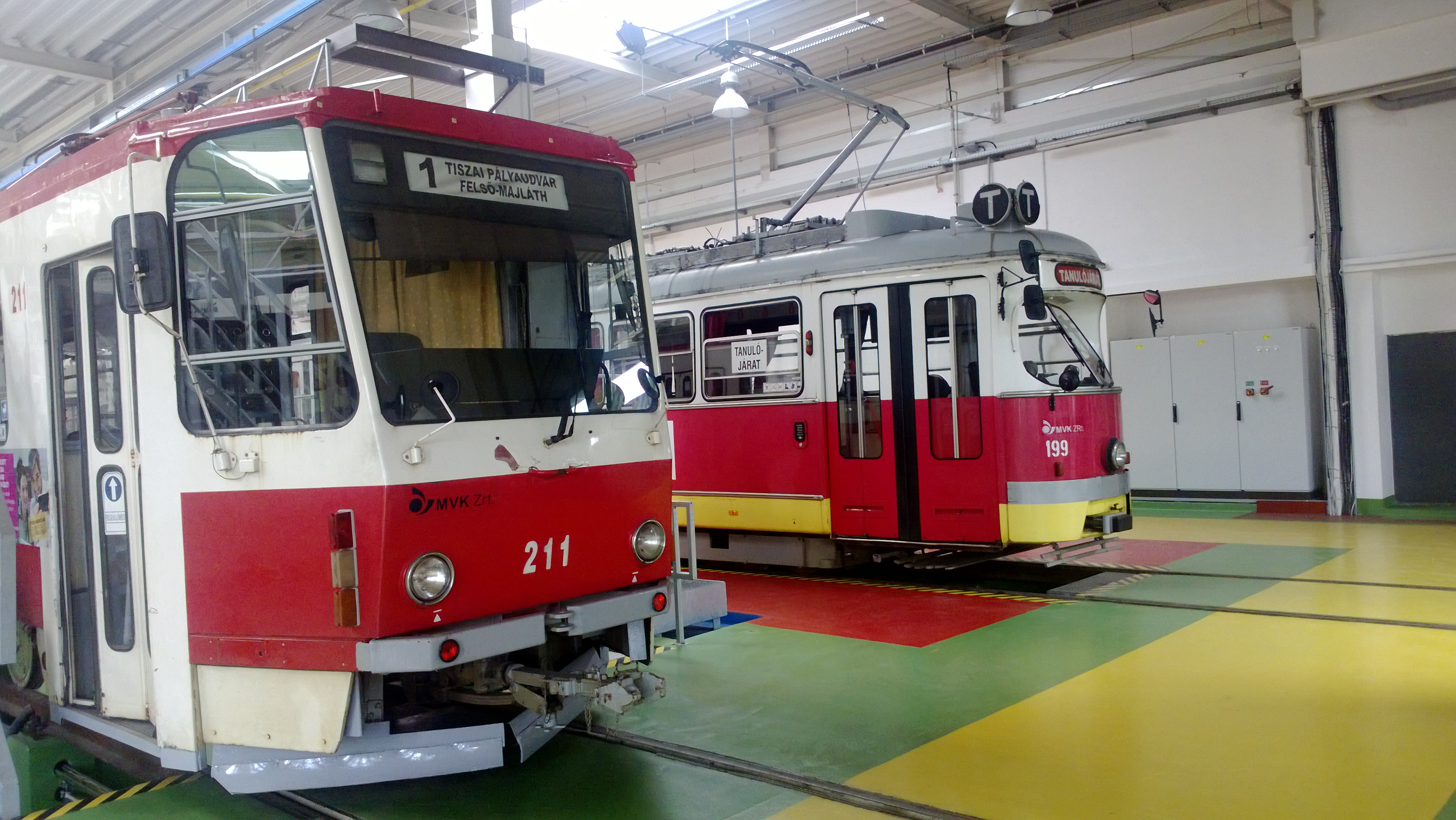 Miskolc járműállománya, Siemens villamos 199.-es kocsi, és a Tátra 211.-es a felújított remízben